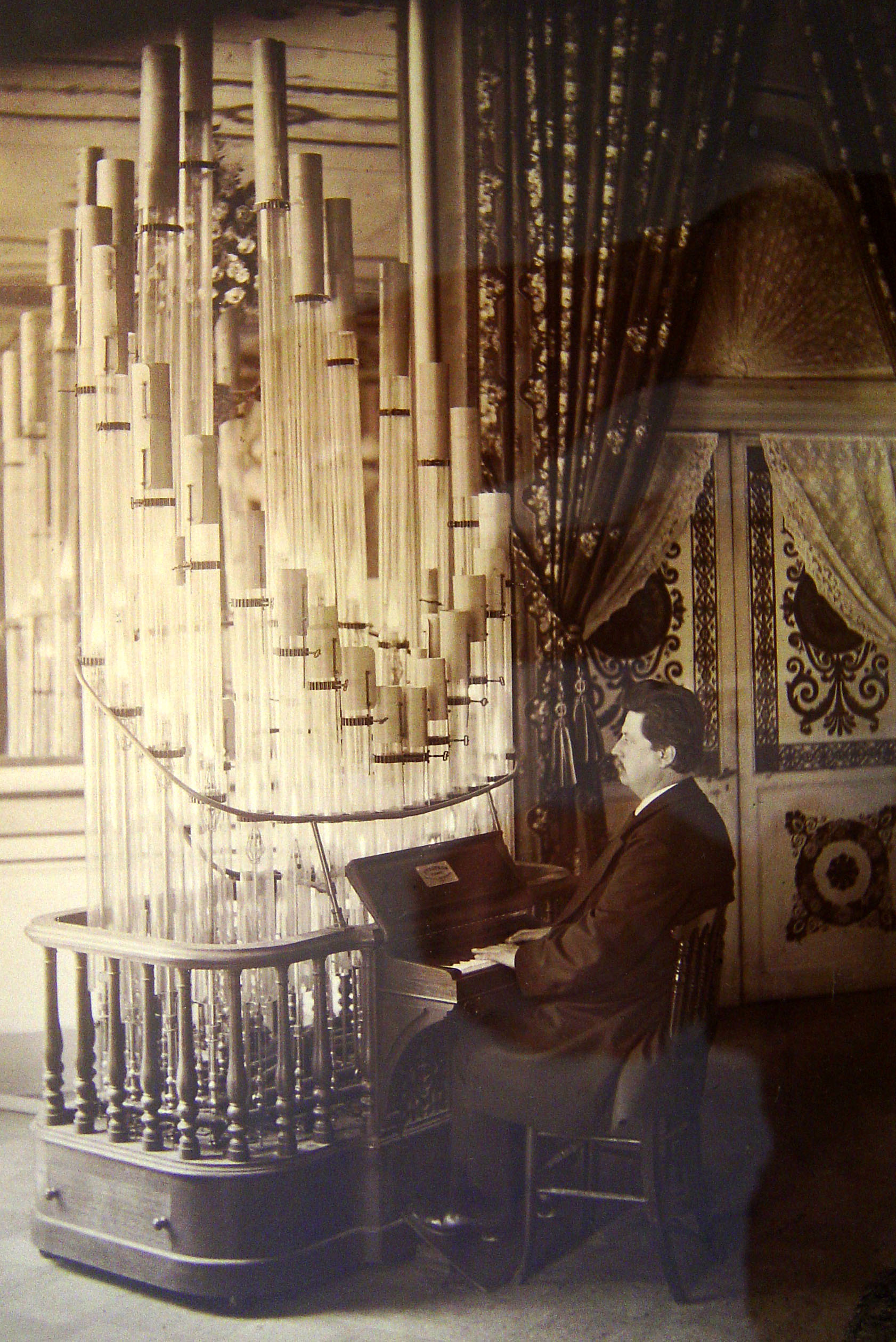 Wendelin Weißheimer spielt auf der Flammenorgel